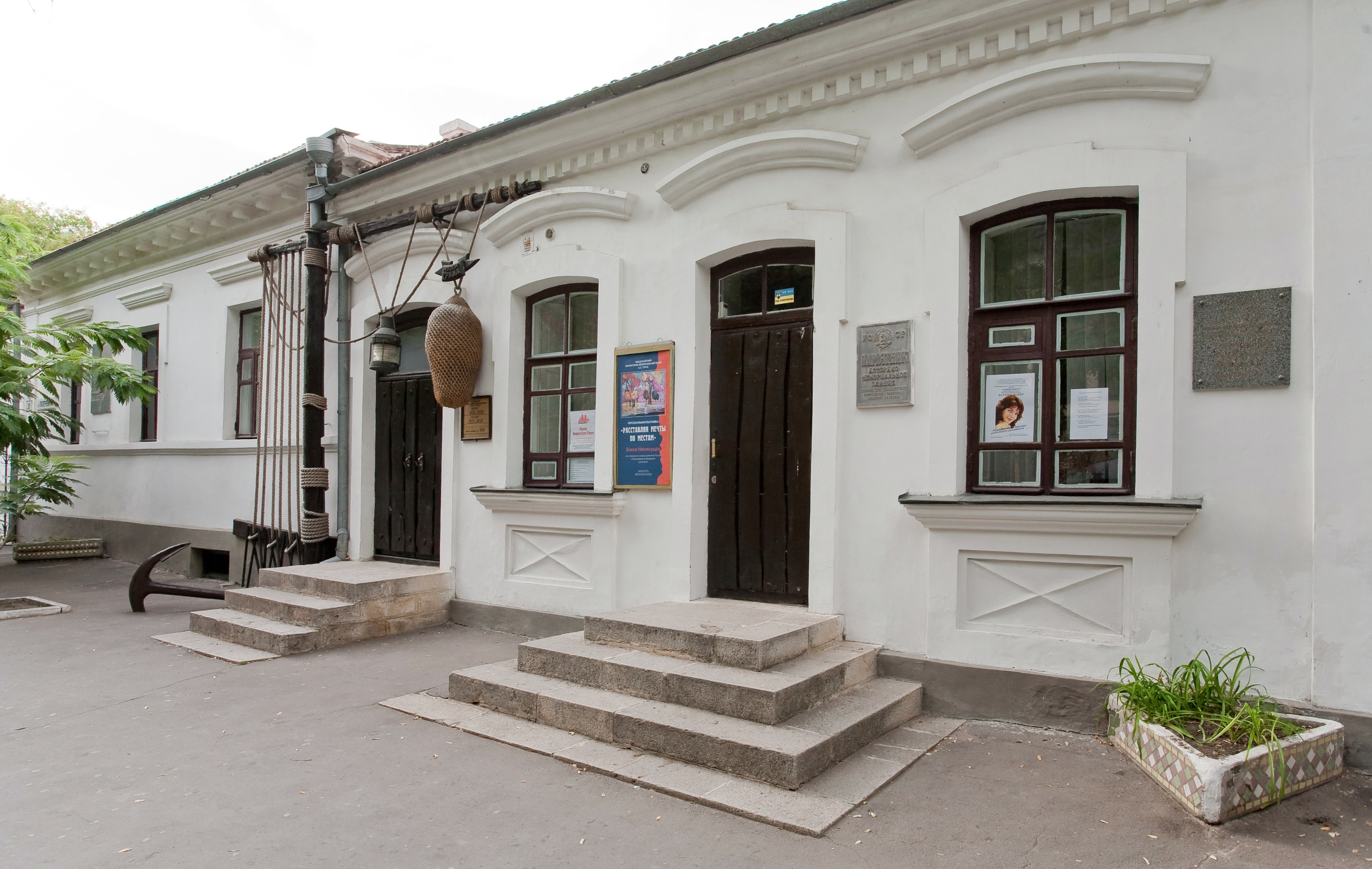 Феодосія, вул. Галерейна, 8-10